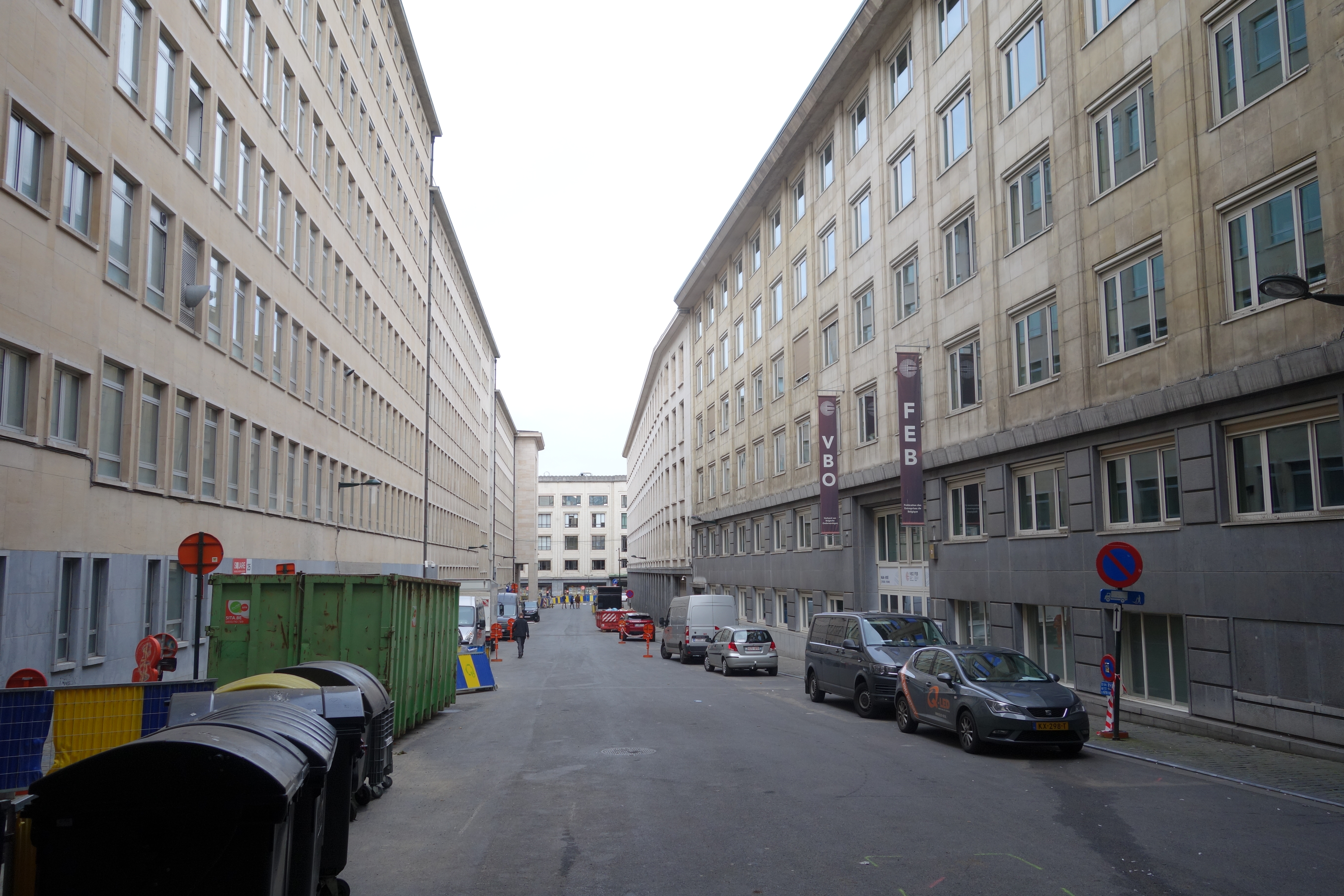 Stuiversstraat